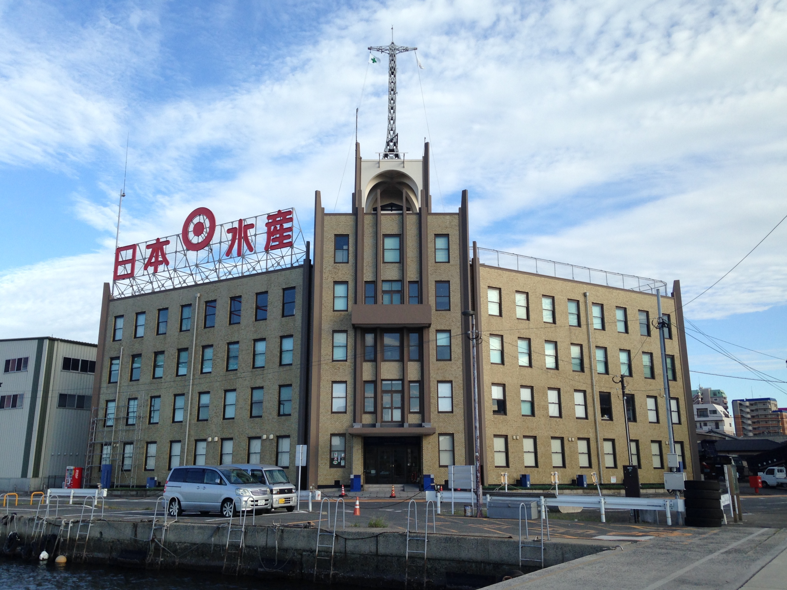 ニッスイ戸畑ビル(旧日本水産福岡支社北九州営業所)